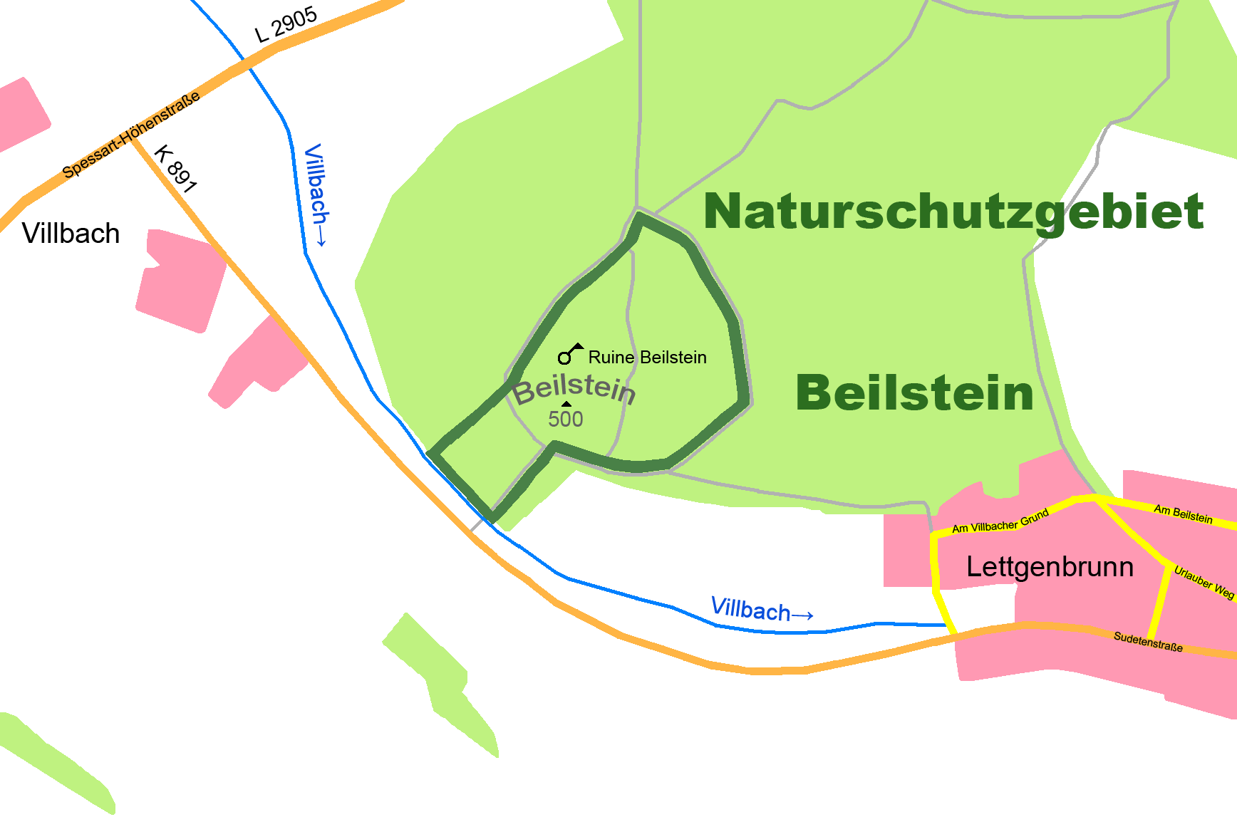 Karte des Naturschutzgebietes Beilstein bei Jossgrund, Hessen Grünfläche, Wiesen Siedlungsfläche Wald Gewässer Berg 500 Höhe über Normalhöhennull Ruine Feld- und Waldwege Naturschutzgebietsgrenze Hauptstraße Nebenstraße